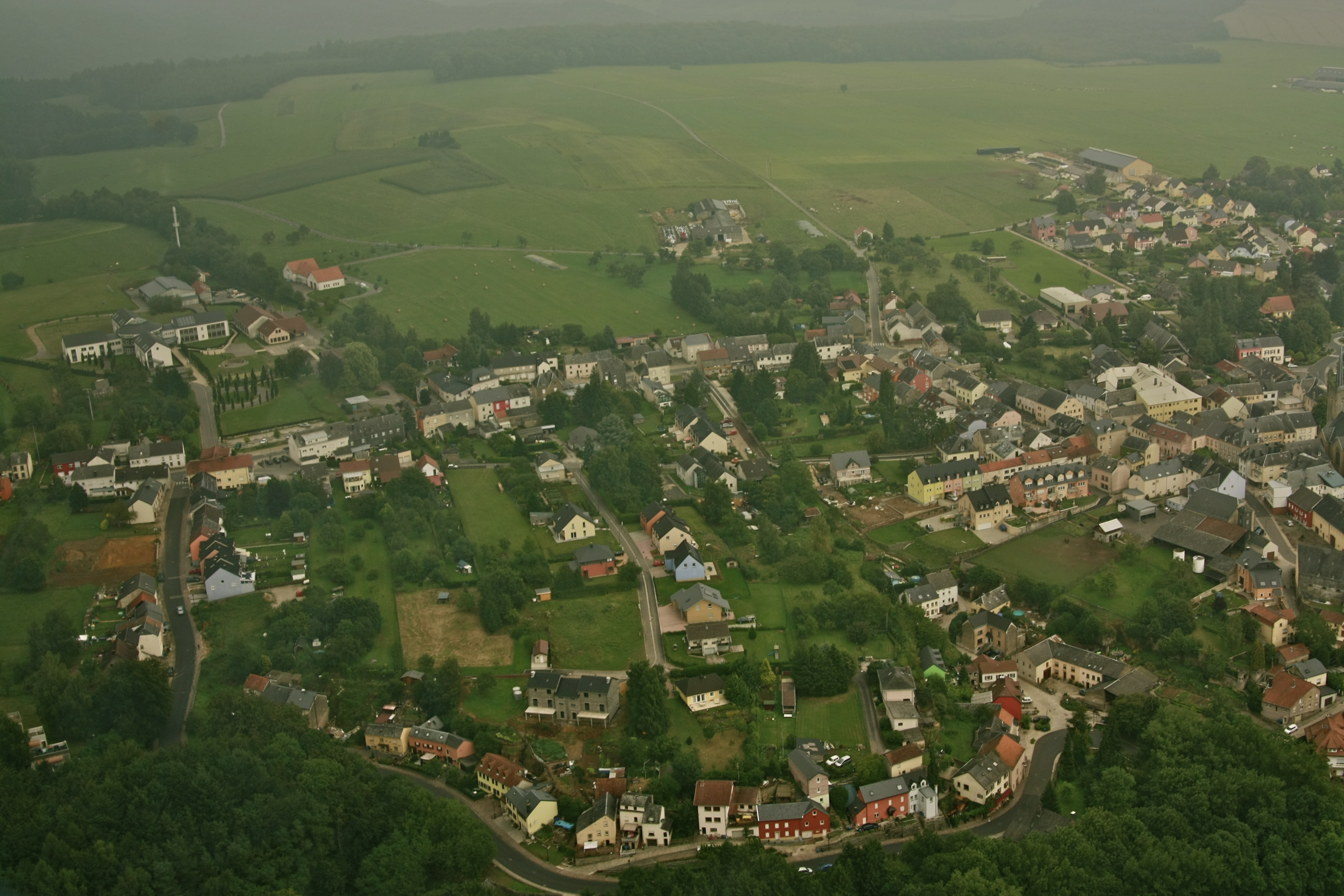 Le village luxembourgeois de Beaufort